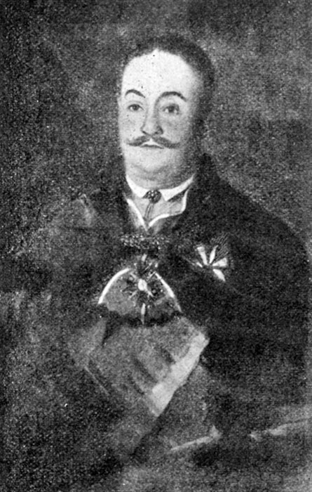 Беларуская (тарашкевіца): Партрэт Адама Хмары, апошняга ваяводы менскага